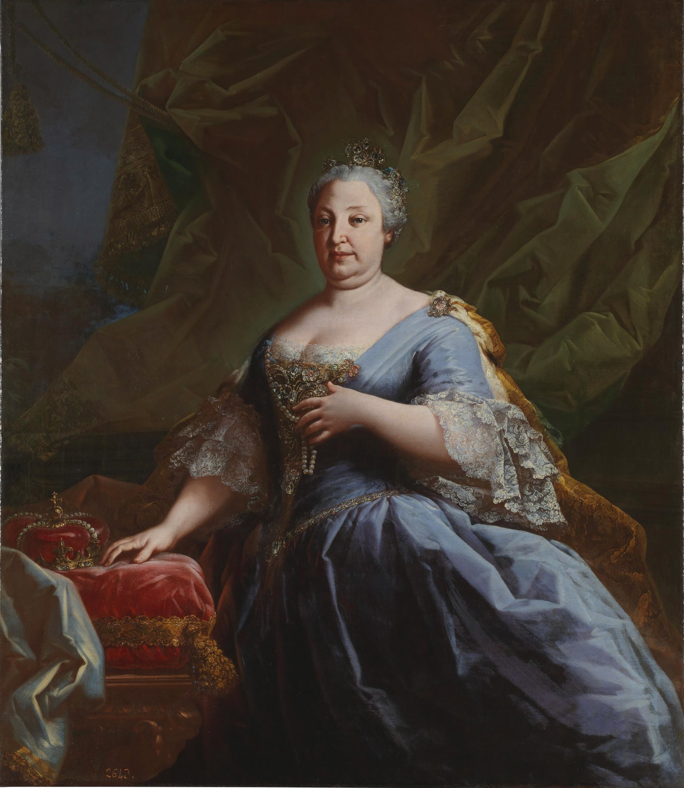 Retrato de la reina Bárbara de Braganza (1711-1758), que fue hija del rey Juan V de Portugal y de la reina María Ana de Austria.